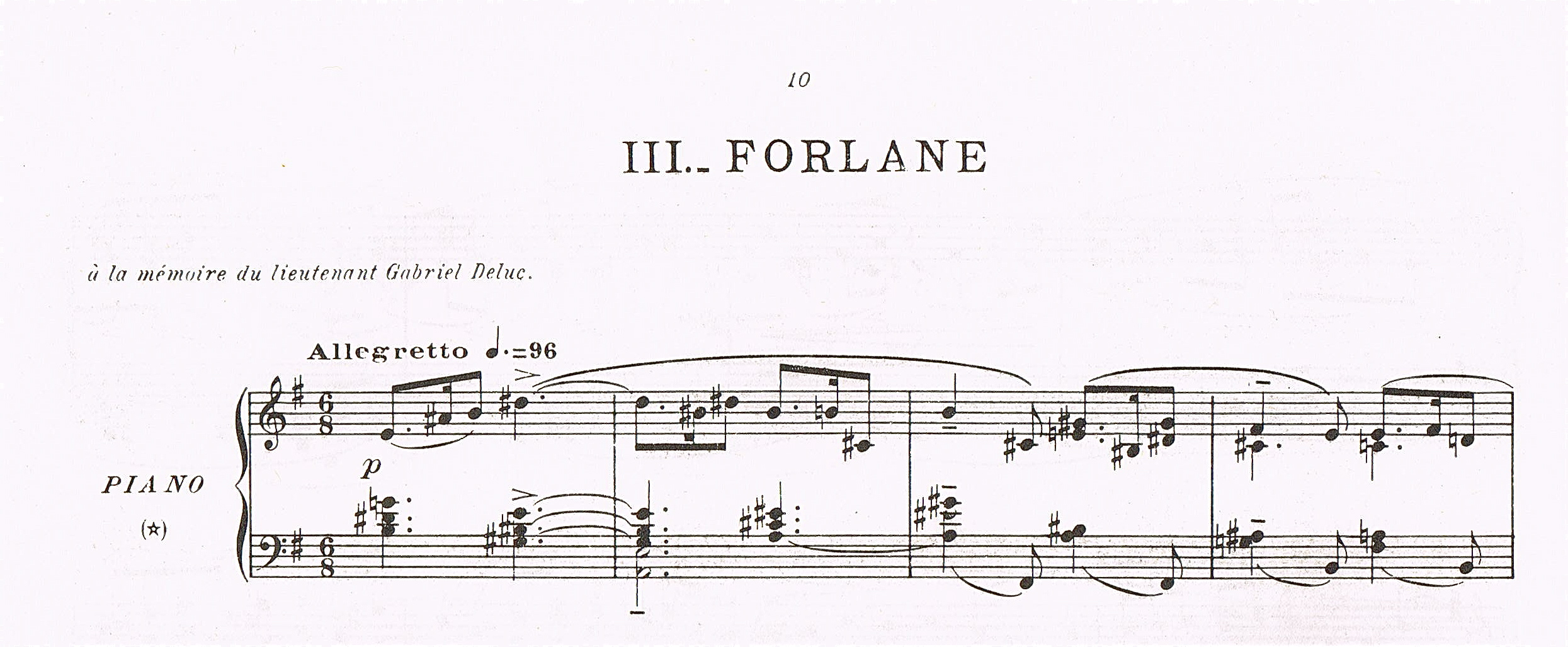 Dédicace de la Forlane du Tombeau de Couperin pour piano Éditions Durand 1918